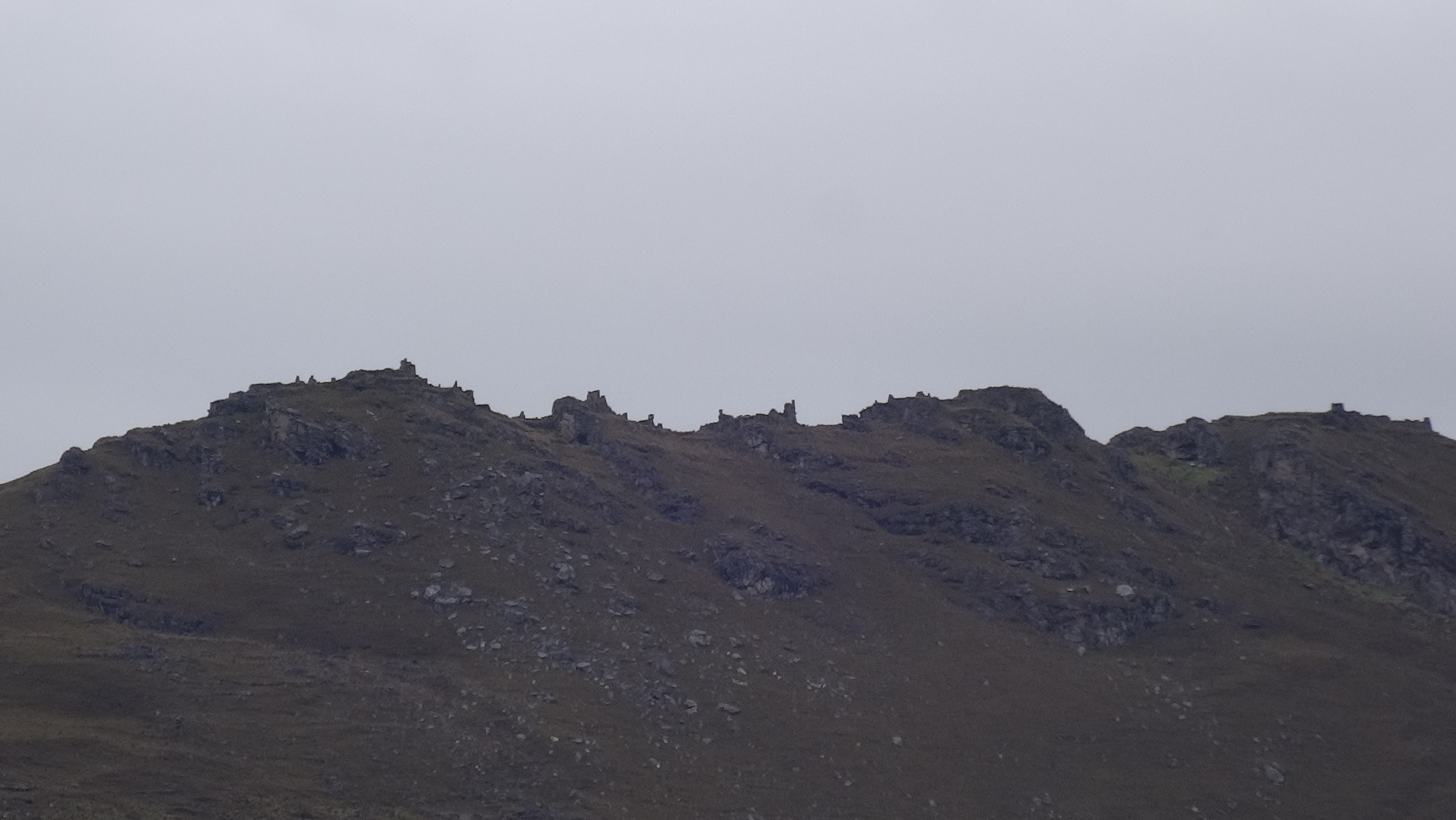 Vista del las ruinas de Japallán desde la trocha hacia la ciudad de Tantamayo.